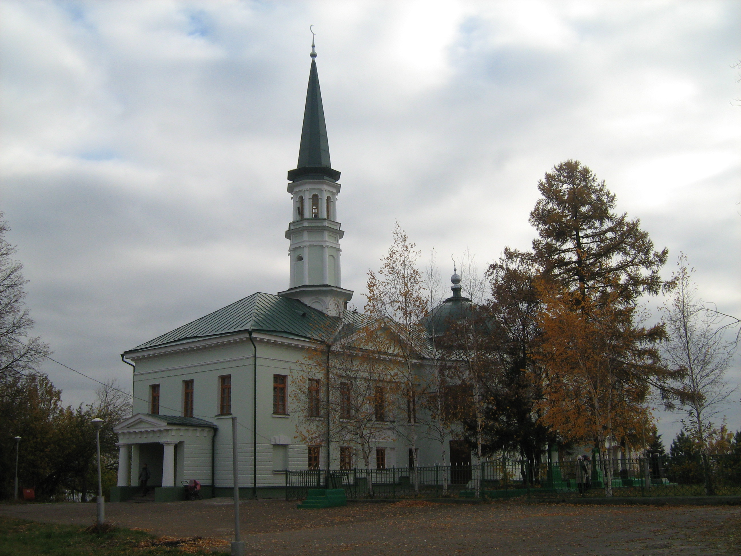 Башҡортса: Беренсә йәмиғ мәсәте, Өфө